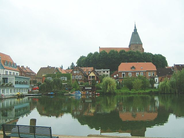 Blick auf die Möllner Altstadt vom gegeüberliegenden Ufer des Stadtsees aus